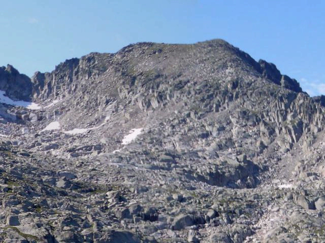 Tuc de Blanc; Naut Aran, Vall d’Aran, Catalunya